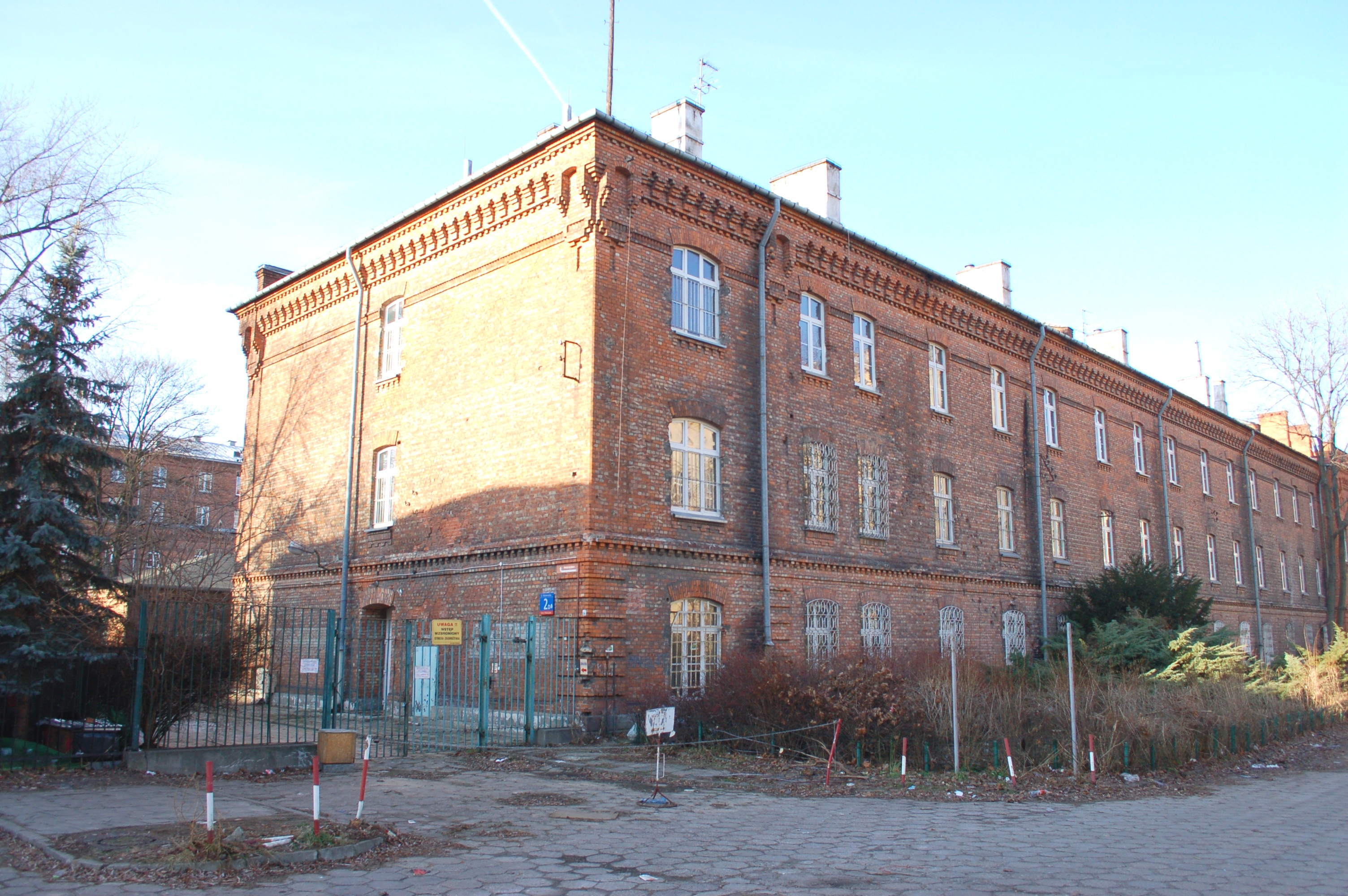 2d Rakowiecka Street in Warsaw